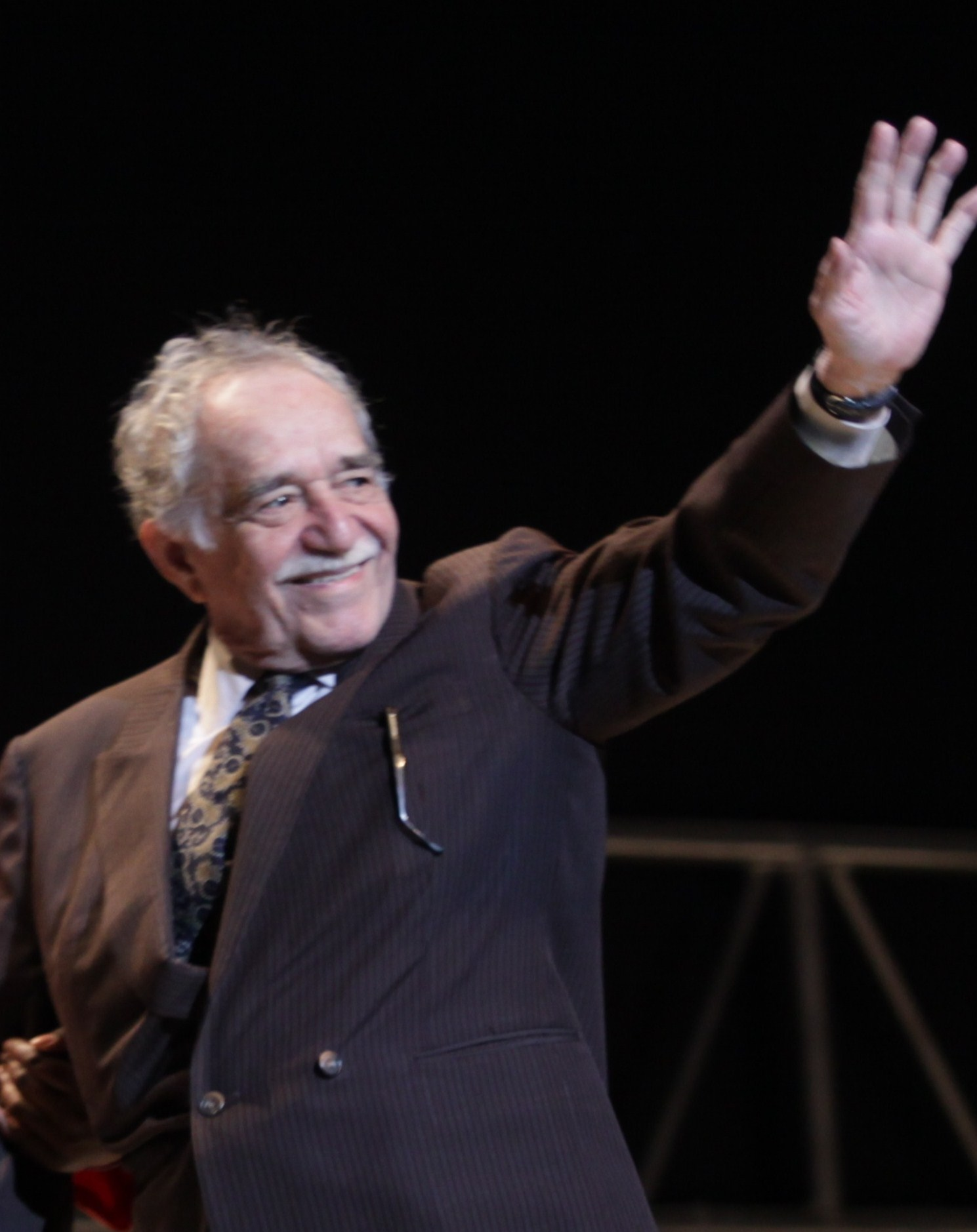 19/03/2009 La Ministra de Cultuta de Colombia Paula Moreno y el escritor colombiano Gabriel García Marquez fueron los encargados de entregar el Mayahuel de Plata a Victor Gaviria